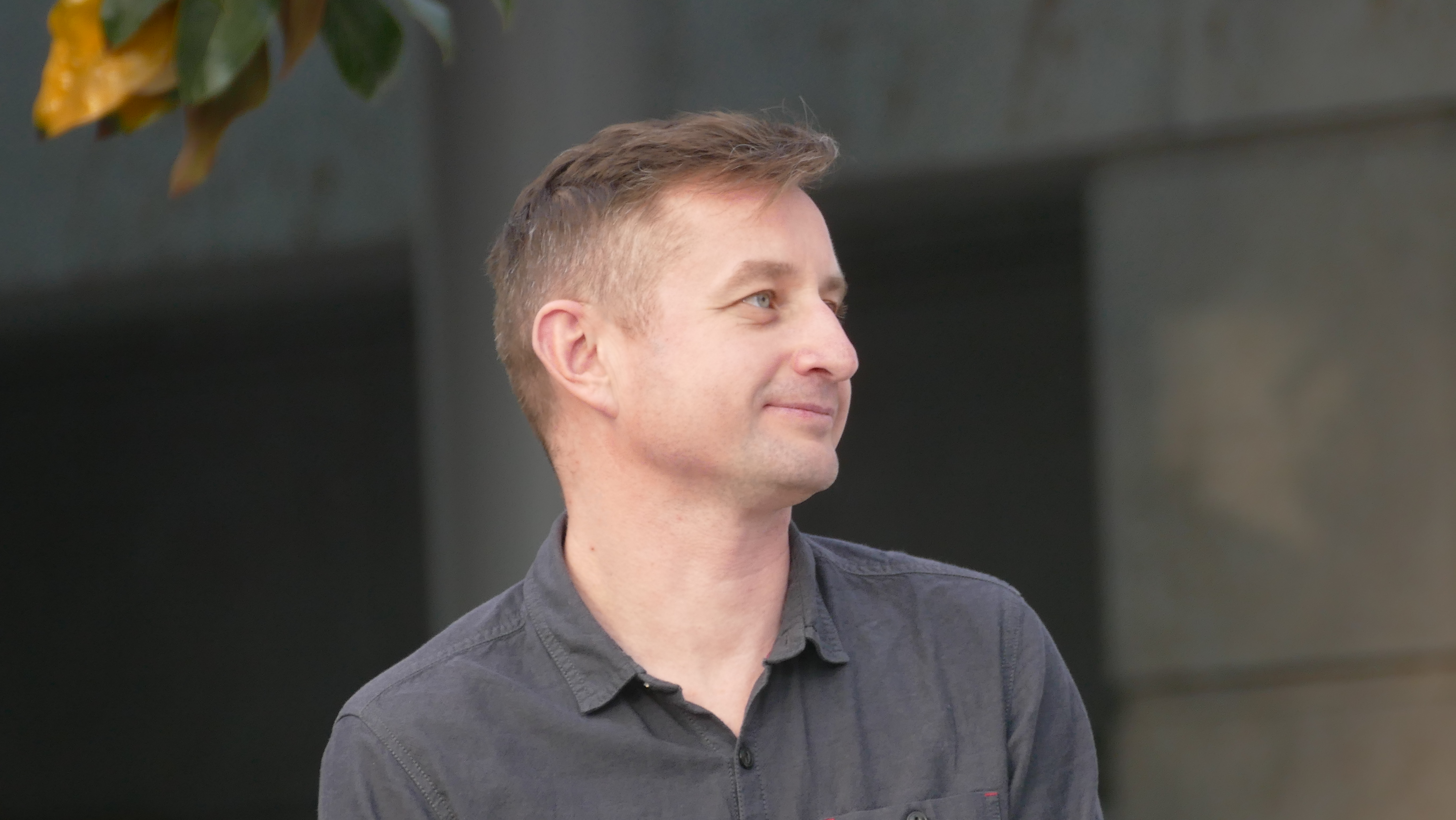 Serhij Zhadan auf der Leipziger Buchmesse 2018